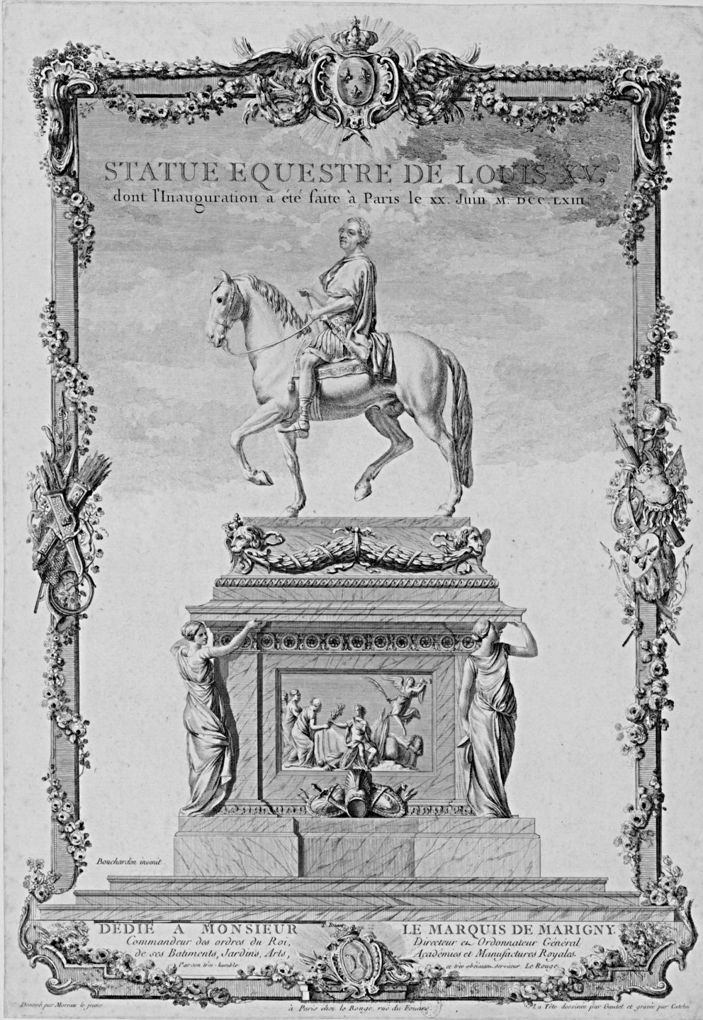 Louis-Jacques Cathelin (1739?-1804), Graveur.- Statue équestre Louis XV, (1710-1774). Estampe de 1767 dédiée à Abel François Poisson marquis de Marigny (1727-1781), Paris chez le Rouge, rue du Fouare. La sculpture a été détruite à la Révolution française, en 1792. Un modèle par Louis-Claude Vassé est visible au musée du Louvre et une réduction par Jean-Baptiste Pigalle (1714-1785) au Musée Carnavalet.